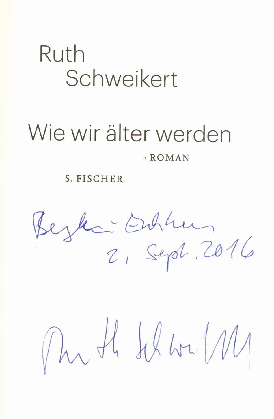 Autograph von Ruth Schweikert, am 2. September 2016, beim Stadtschreiberfest in Bergen.